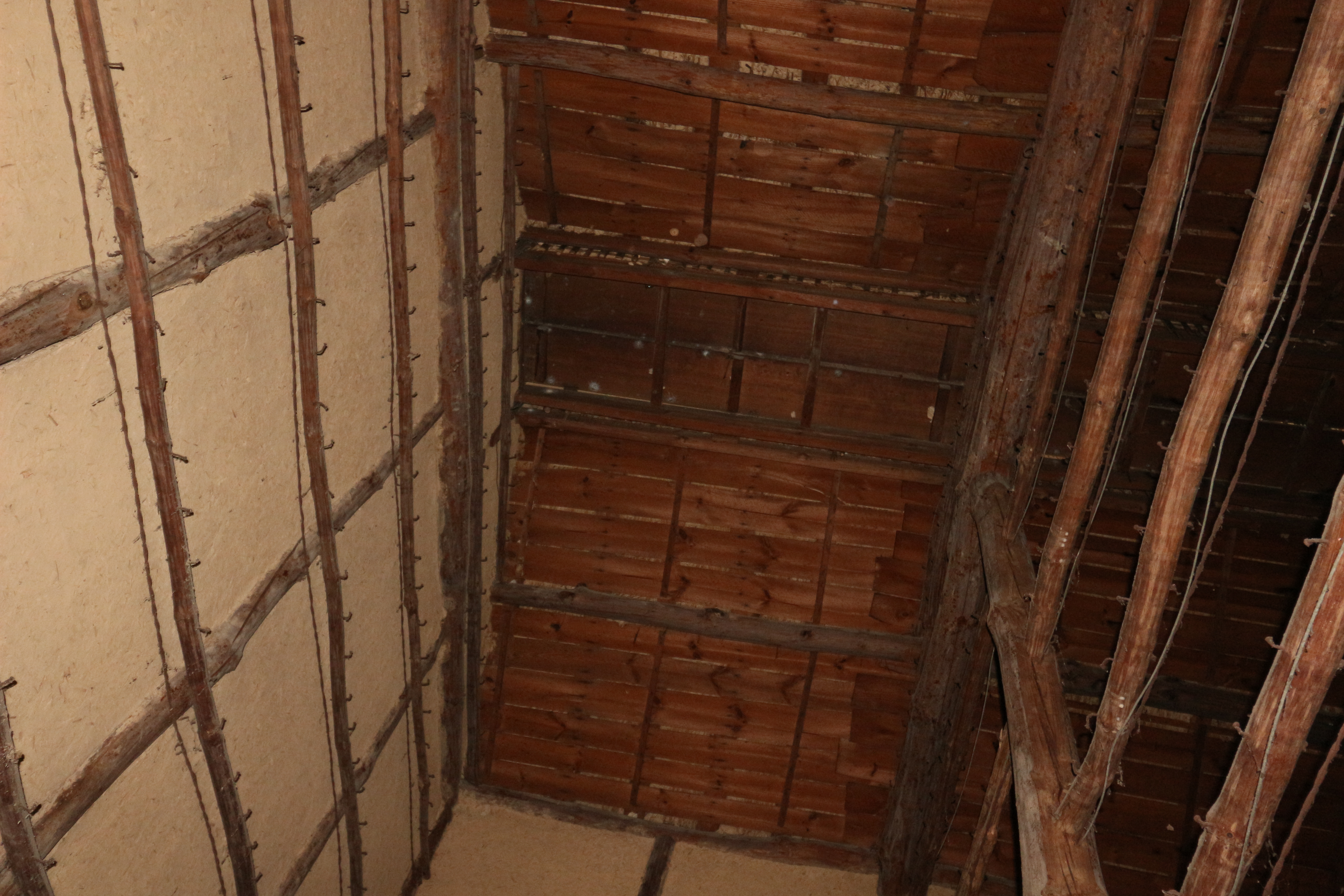 岡山県井笠地方に残るタバコ乾燥小屋の内部